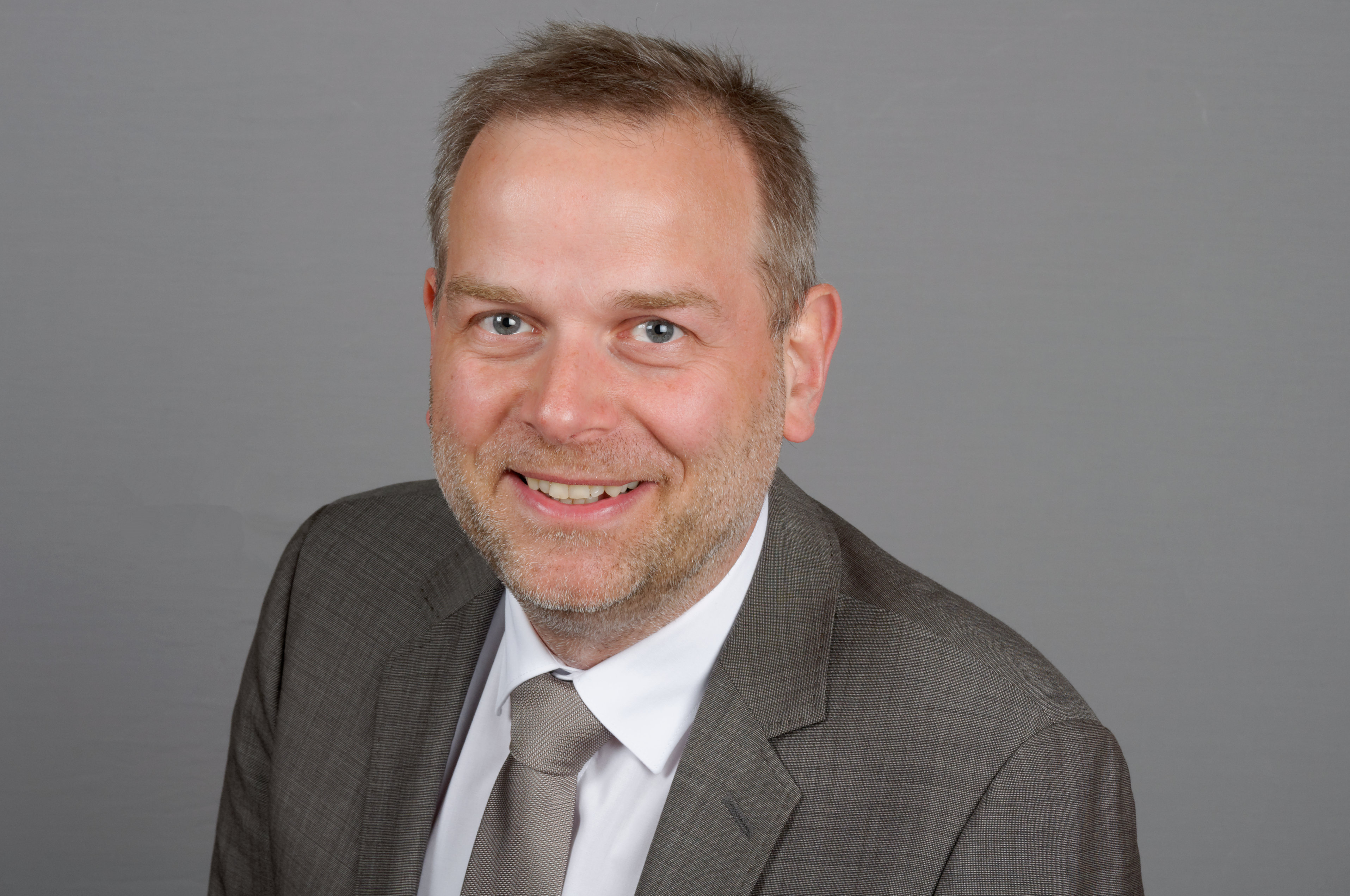 Leif-Erik Holm, MdL Mecklenburg-Vorpommern